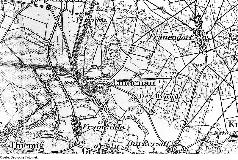 Original image description from the Deutsche Fotothek Lindenau. Reichskarte, 1:100.000, Einheitsblatt Nr. 89, 1922